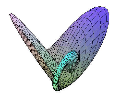 Surface de Boy Paramétrisation de François Apéry : x := cos(s)*(1 - sqrt(2)*sin(s)*cos(s)*sin(3*t))^(-1)*((sqrt(2)/3)*cos(s)*cos(2*t) + (2/3)*sin(s) *cos(t)): y := cos(s)*(1 - sqrt(2)*sin(s)*cos(s)*sin(3*t))^(-1)*((sqrt(2)/3)*cos(s)*sin(2*t) - (2/3)*sin(s)*sin(t)): z := cos(s)*(1 - sqrt(2)*sin(s)*cos(s)*sin(3*t))^(-1)*(cos(s))